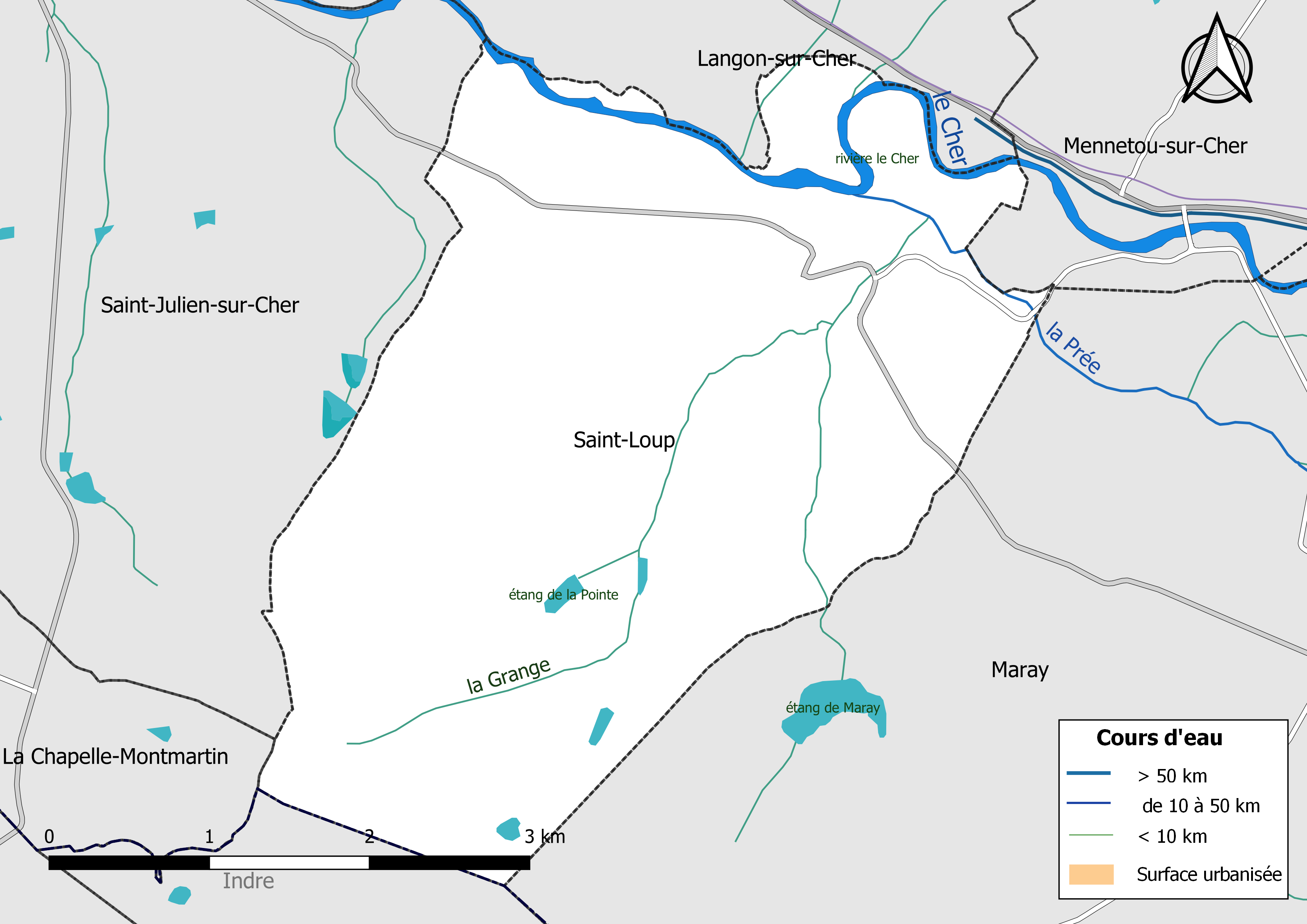 Carte du réseau hydrographique de la commune de Saint-Loup (Loir-et-Cher) (France).